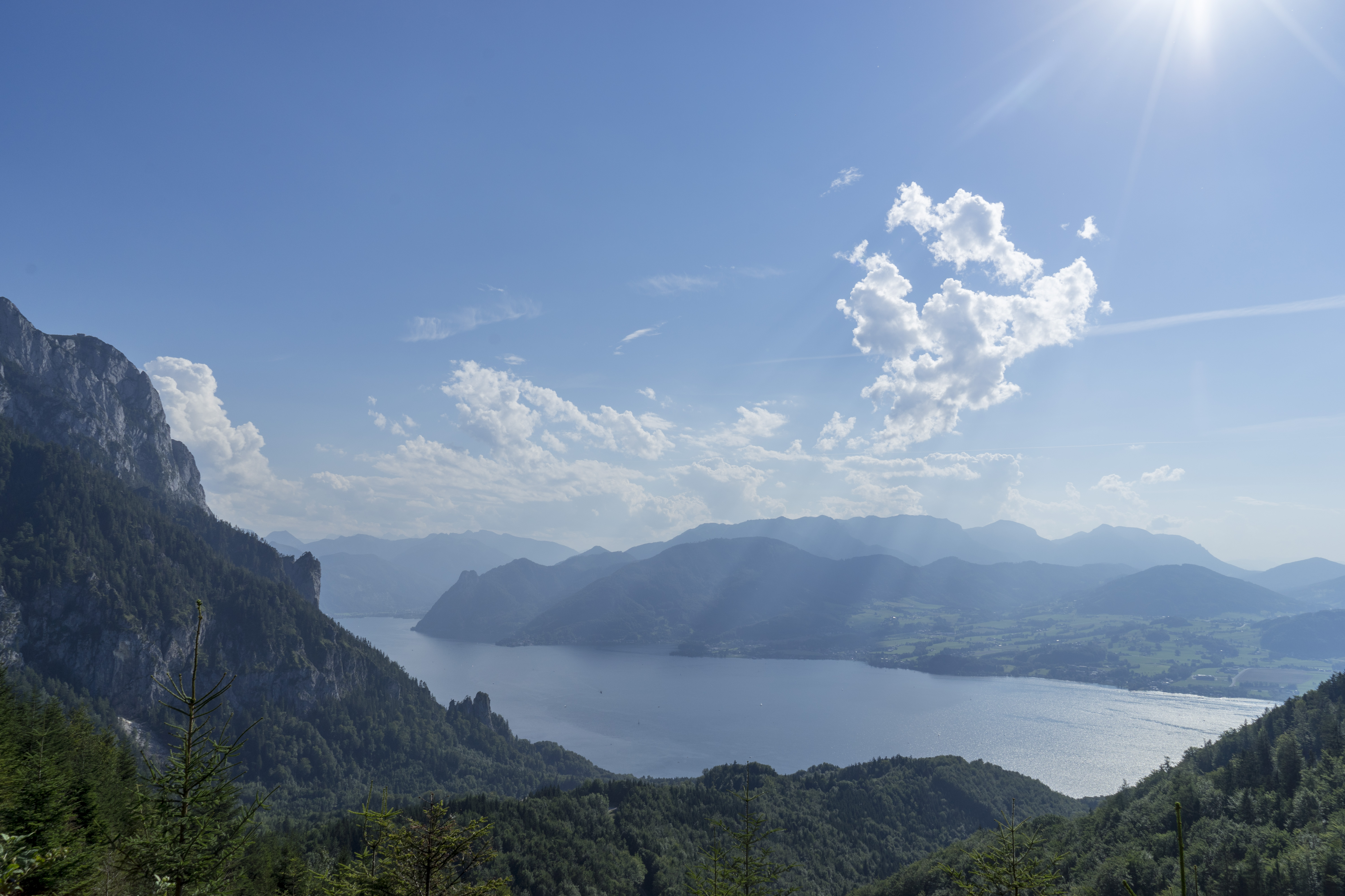 Traunsee, Blickrichtung Süden, vom Grünberg aus gesehen. In den See ragend der Sonnstein